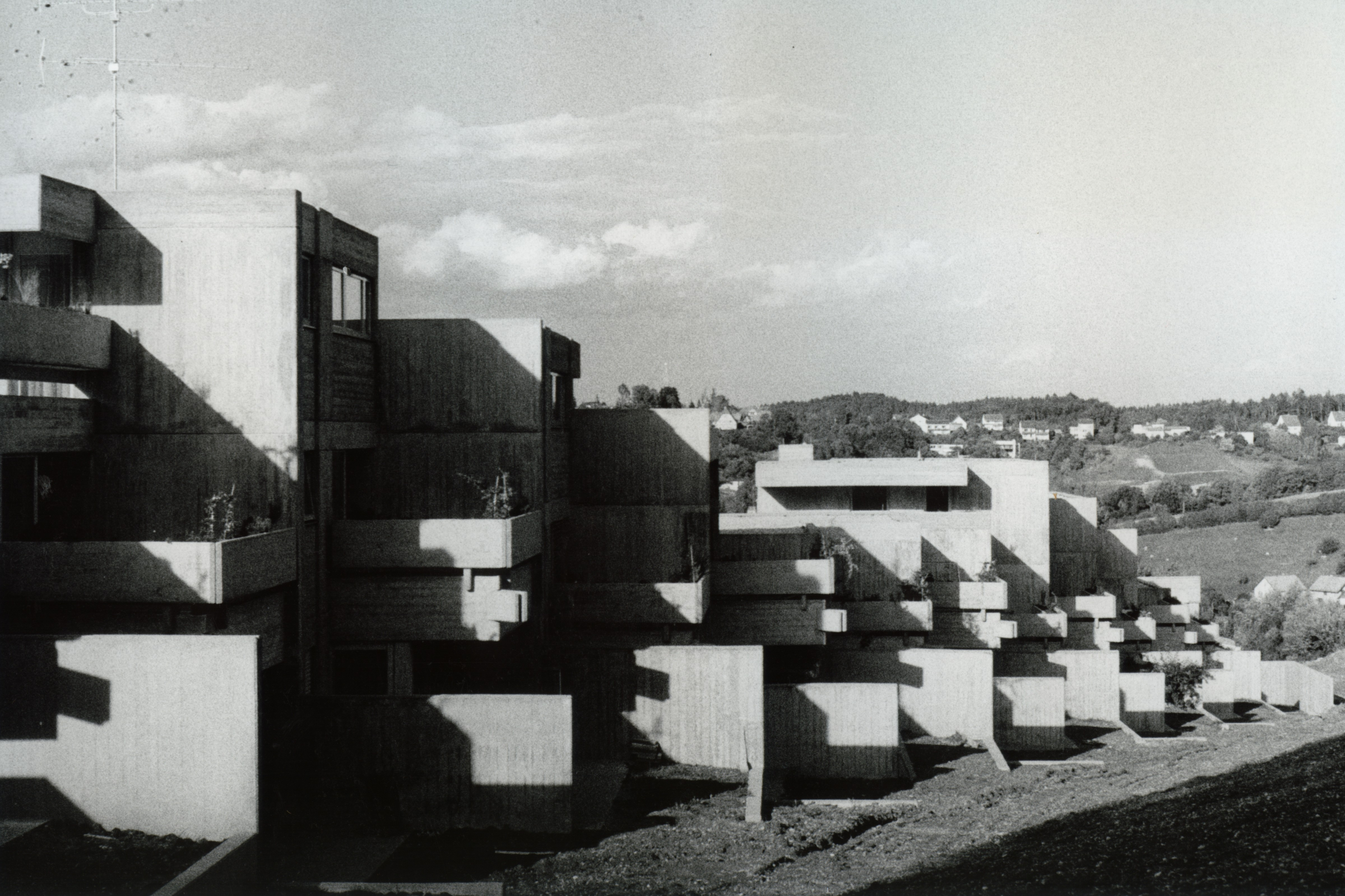 Wohnanlage am Dünzlpark Landshut (1975) Architekt Willi Zeilhofer